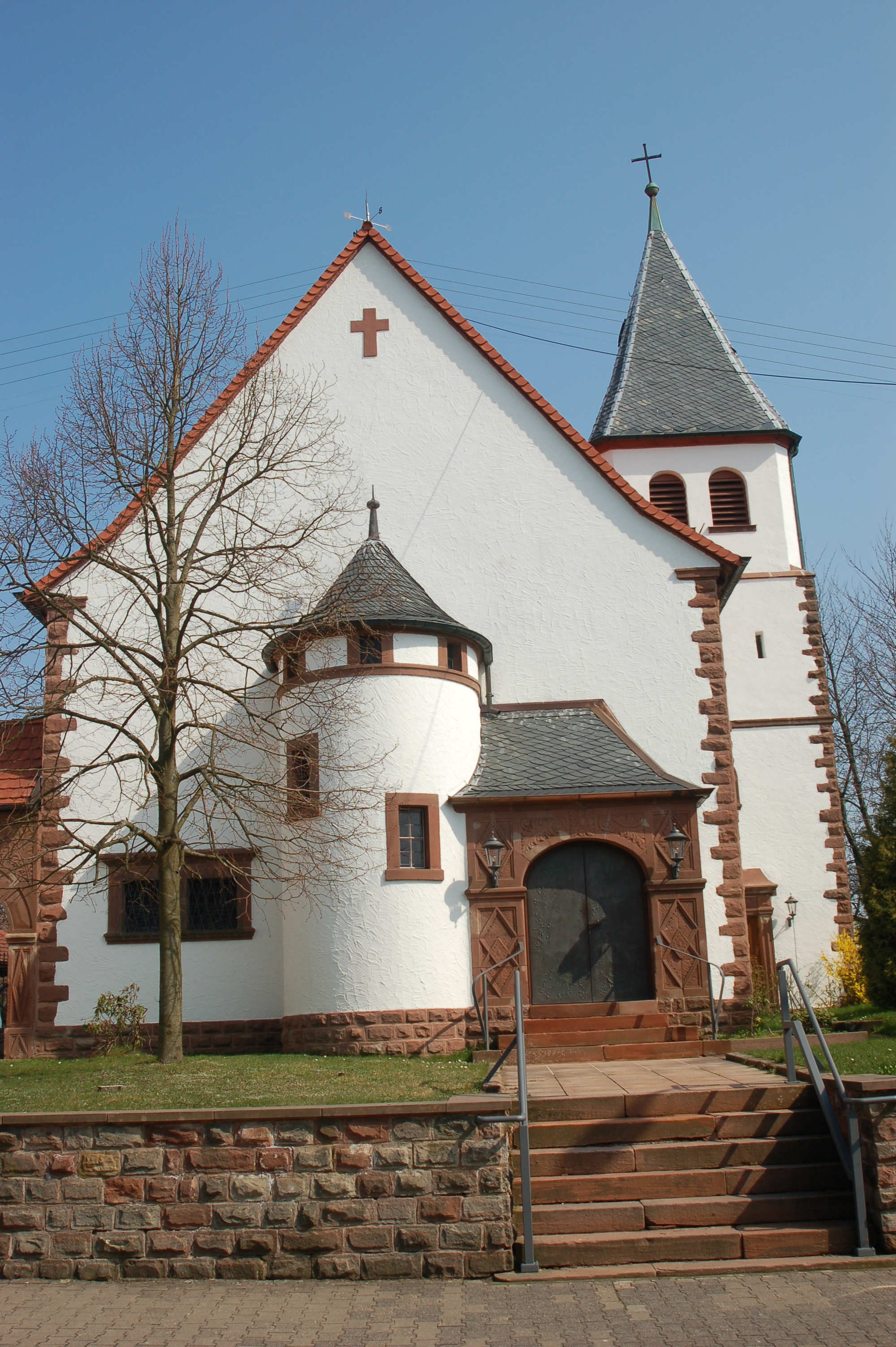 Selbst erstelltes Bild (Ortszentrum Hermersberg, ev. Kirche) Author: Volker Fremgen Datum: 01.04.2007